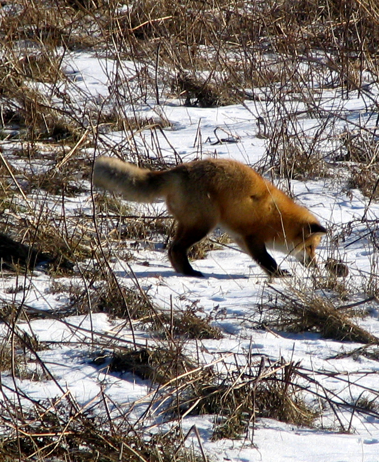 Renard Roux chassant un petit rongeur vivant dans sa galerie sous la neige (Îles-de-la-Madeleine).